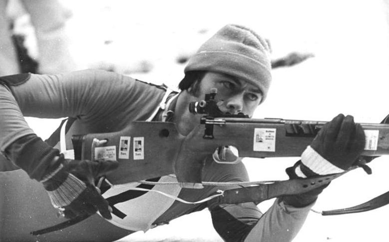 Eberhard Rösch ADN-ZB Schaar 29.2.80 Oberhof: Den ersten Titel bei den DDR-Biathlonmeisterschaften holte sich der olympische Bronzemedaillen-Gewinner Eberhard Rösch von Dynamo Zinnwald im 20-km-Wettbewerb.